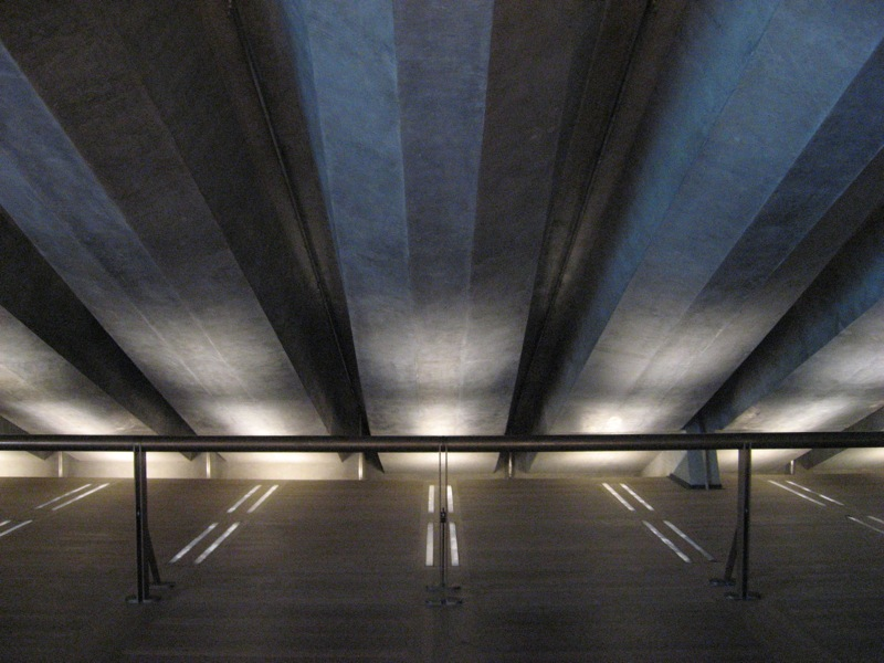 Unión costillas bóvedas ópera de Sydney